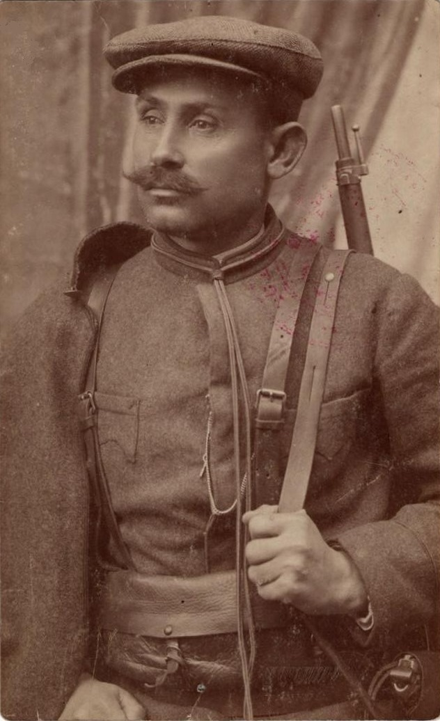 Kresto Lazarof